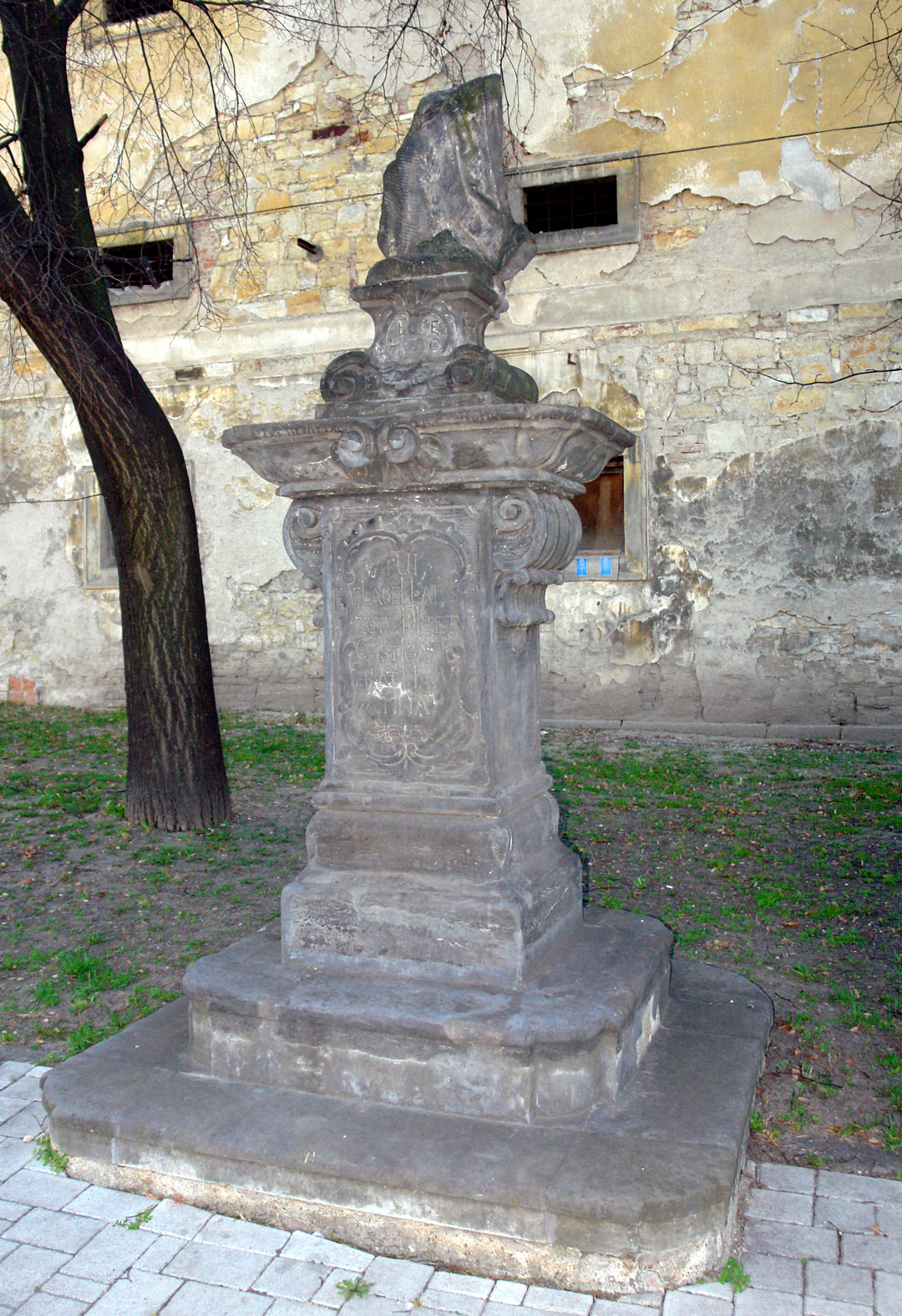 Socha Ecce Homo - sokl (Doksany), před klášterem, Doksany